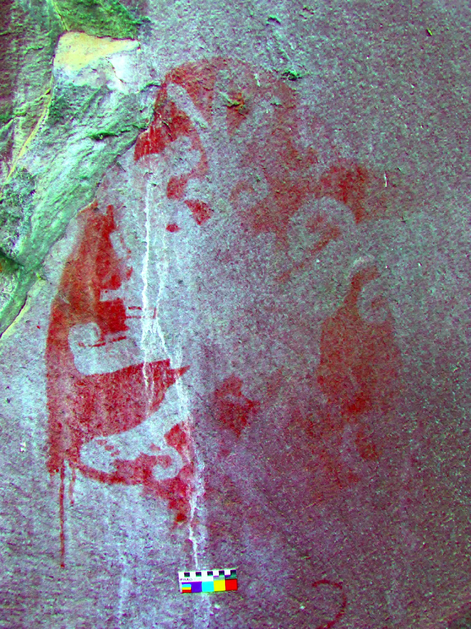 Pintura en negativo con rasgos característicos del Posclásico Tardío